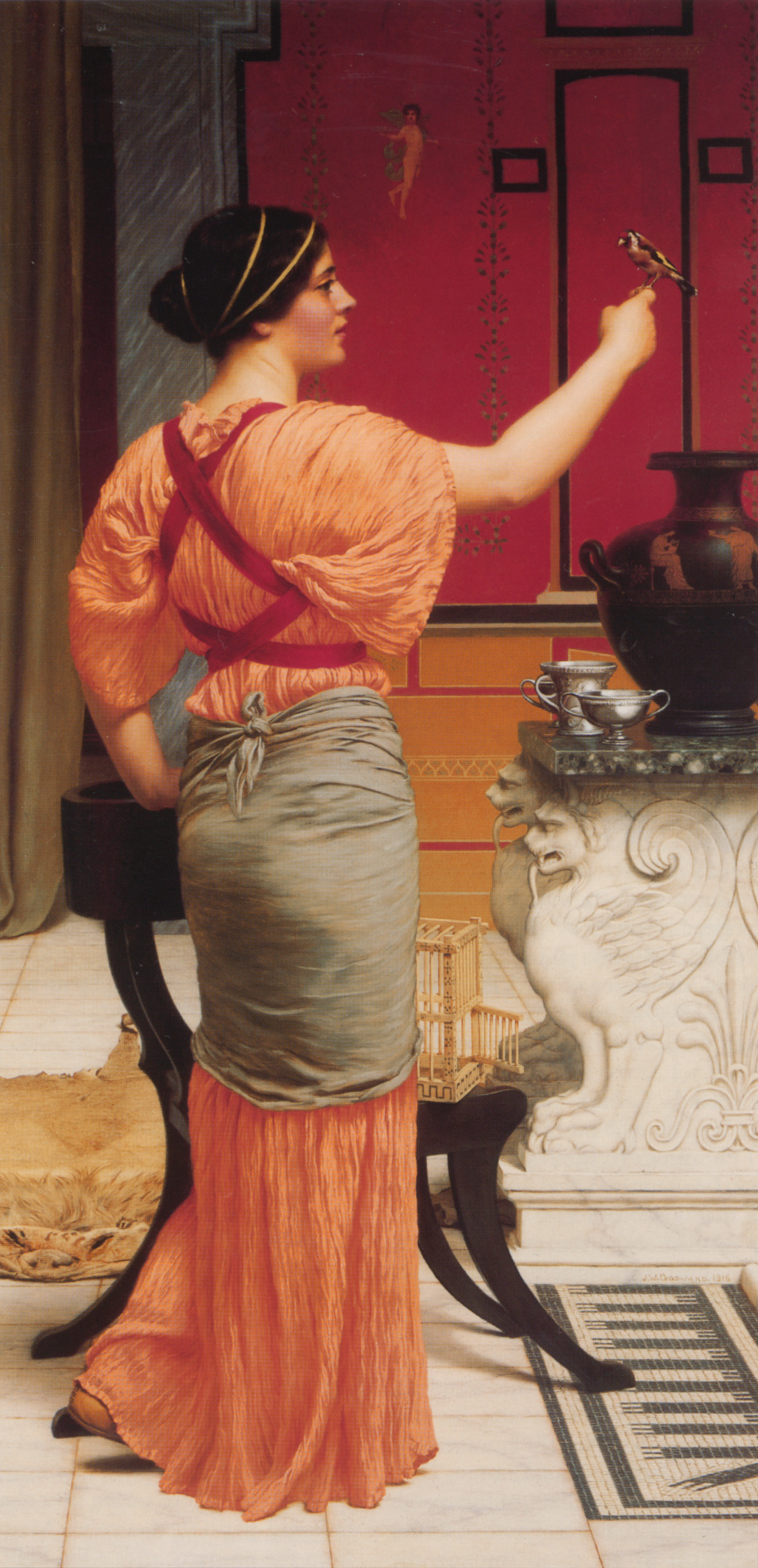 Le tableau représente Lesbie, personnages récurrent des élégies du poète romain Catulle qui la présente comme la femme qu'il aime. Le tableau s'inspire en particulier du poème 2 dans lequel Catulle évoque la mort du moineau apprivoisé de sa maîtresse.